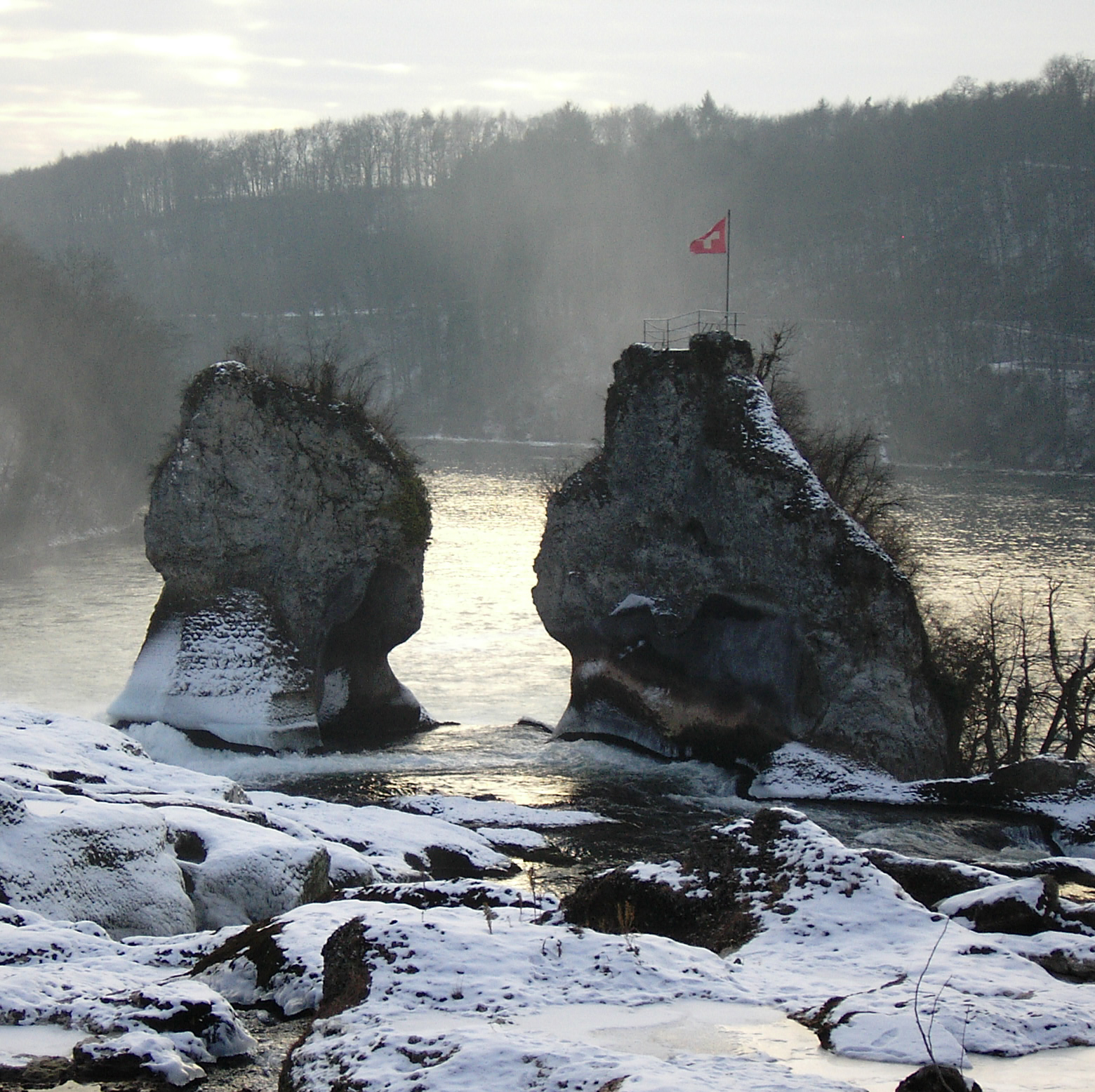 Rhein falls in Switzerland.